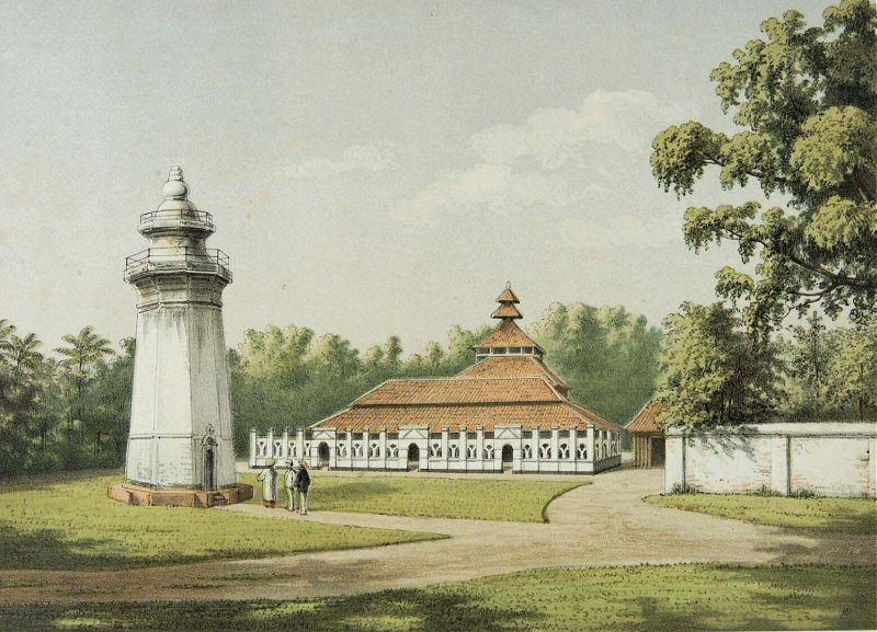 Litho. Kleurenlitho naar een oorspronkelijke aquarel van Rappard.. De moskee en minaret in Karang Antu